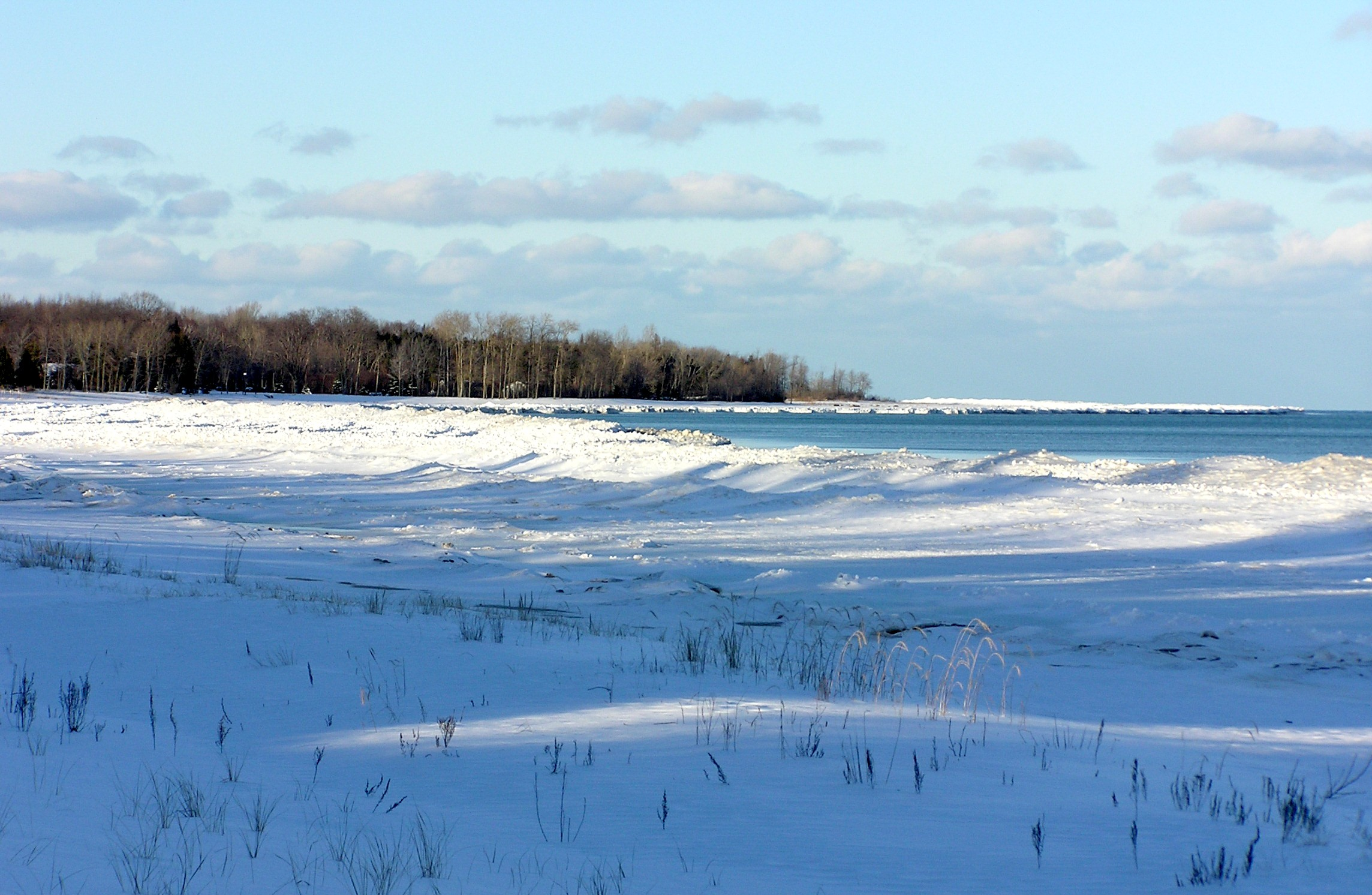 Ice dunes on Lake Huron